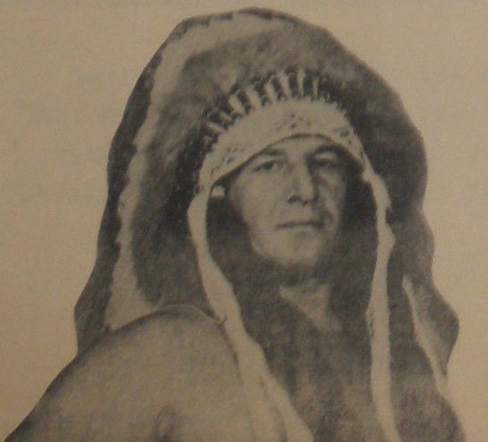 Chief Jay Strongbow dans un programme de catch Heavyweight Wrestling du 31 août 1970